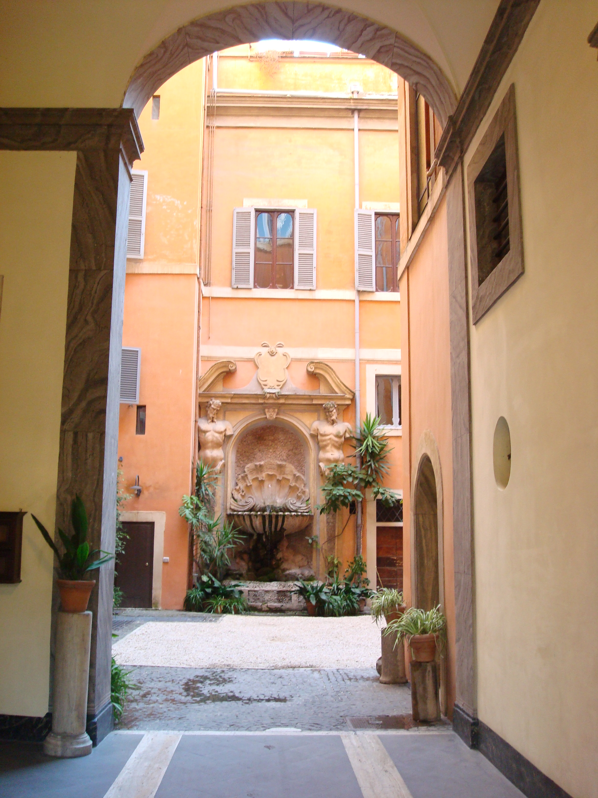 Ecco come si presenta l'ingresso